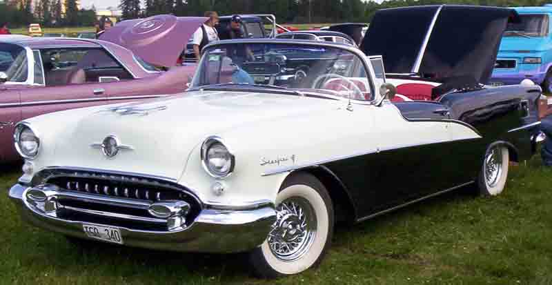 Oldsmobile 98 Convertible 1955